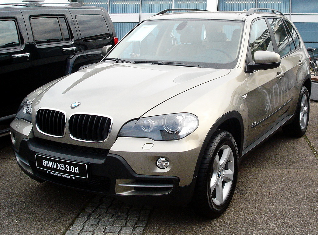 Modell 2007 des BMW X5